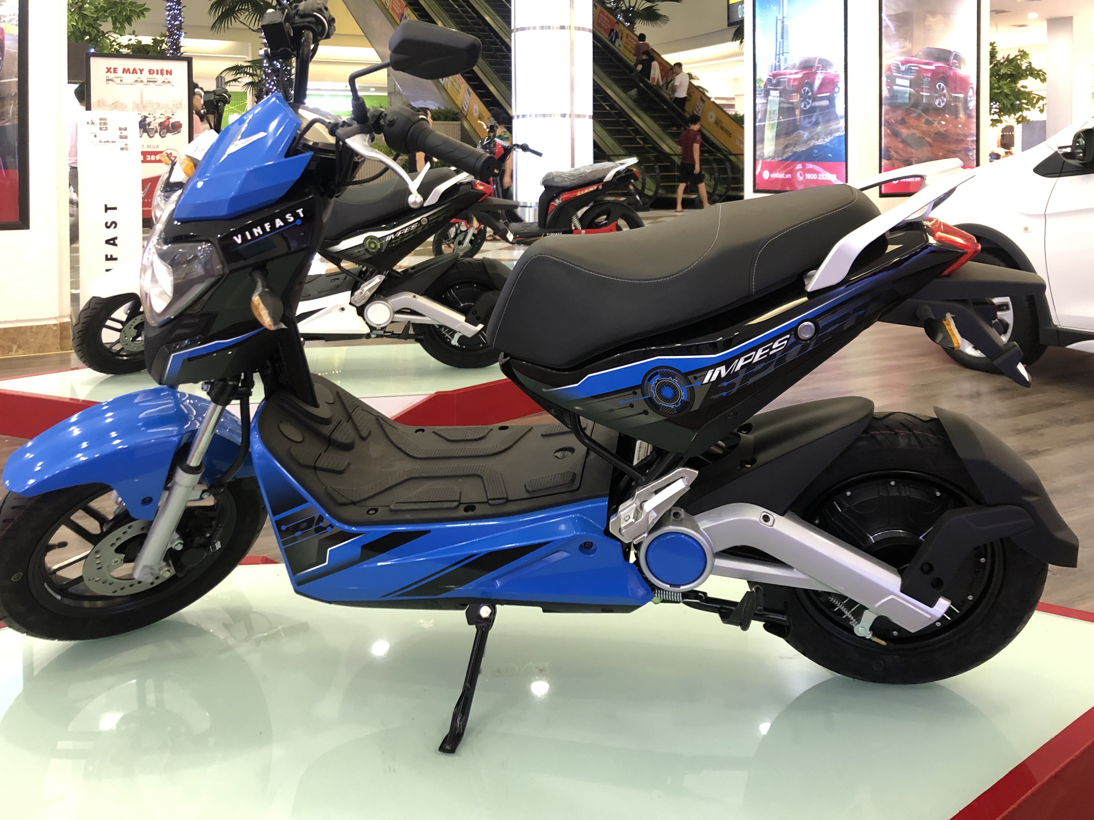 Xe máy điện VinFast Impes màu xanh blue